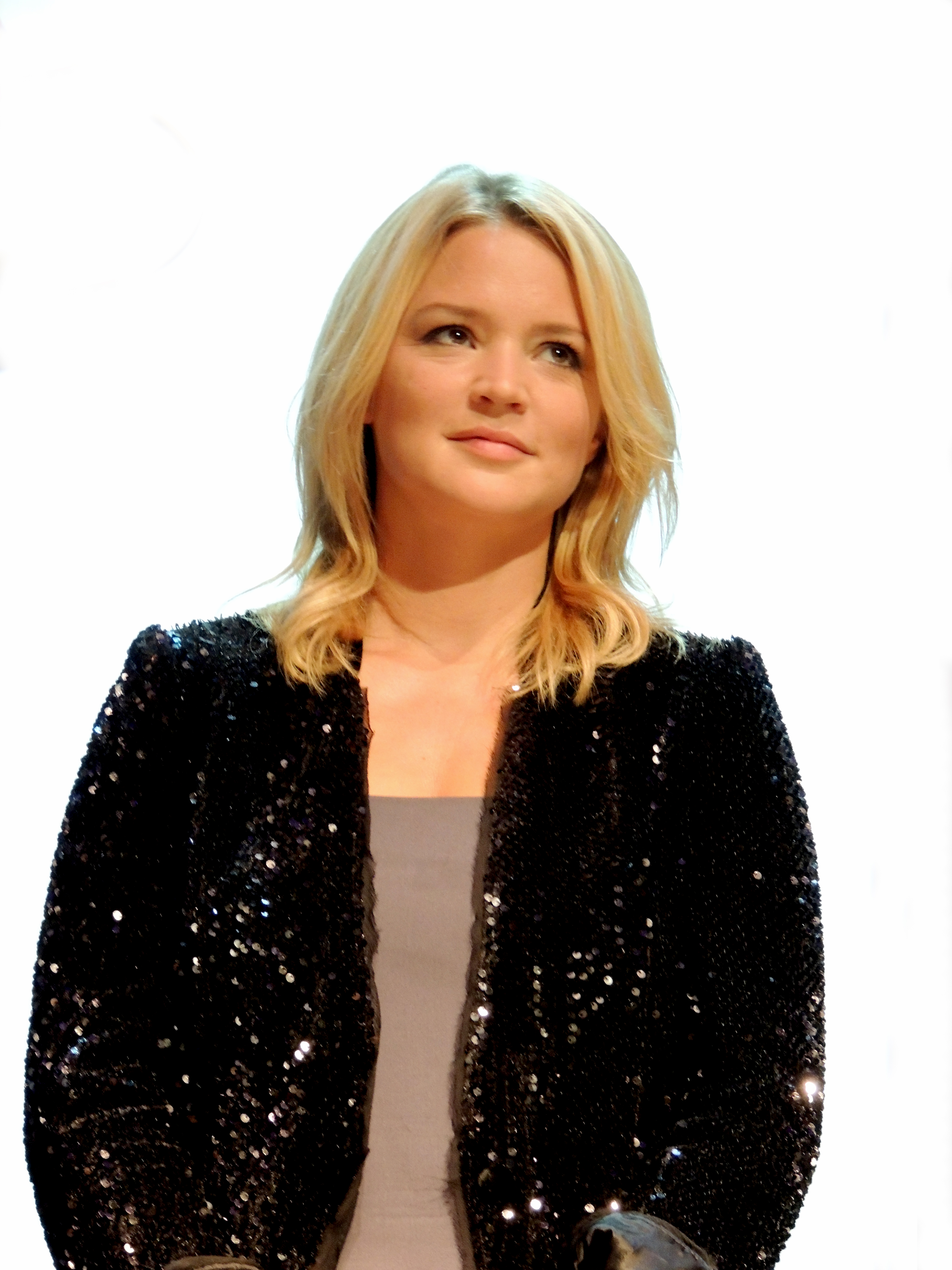 Virginie EFIRA en 2013